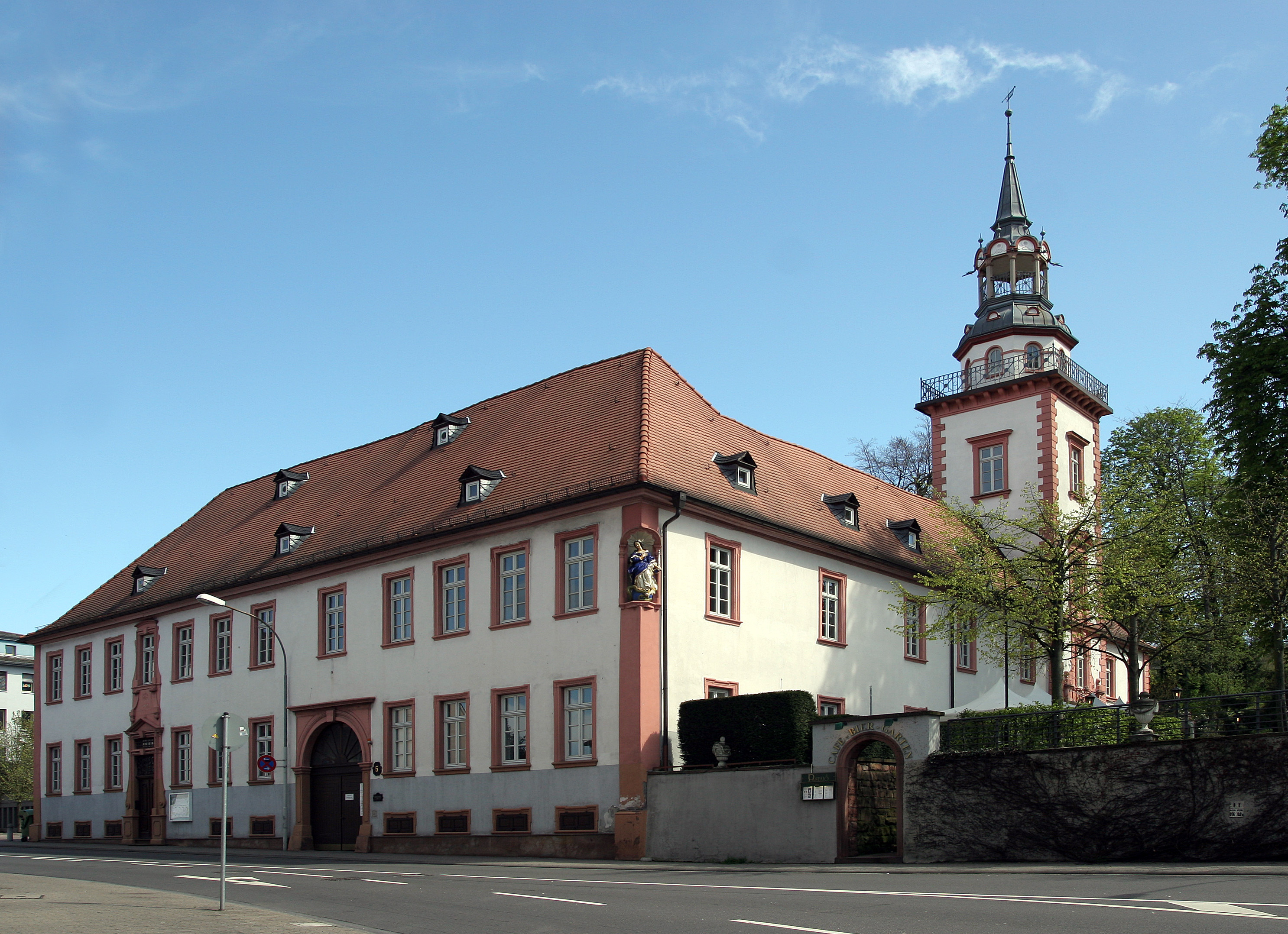 Der Rodensteiner Hof in Bensheim (Südhessen)